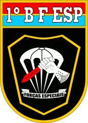 Insígnia do 1° Batalhão de Forças Especiais, uma unidade do Exército Brasileiro